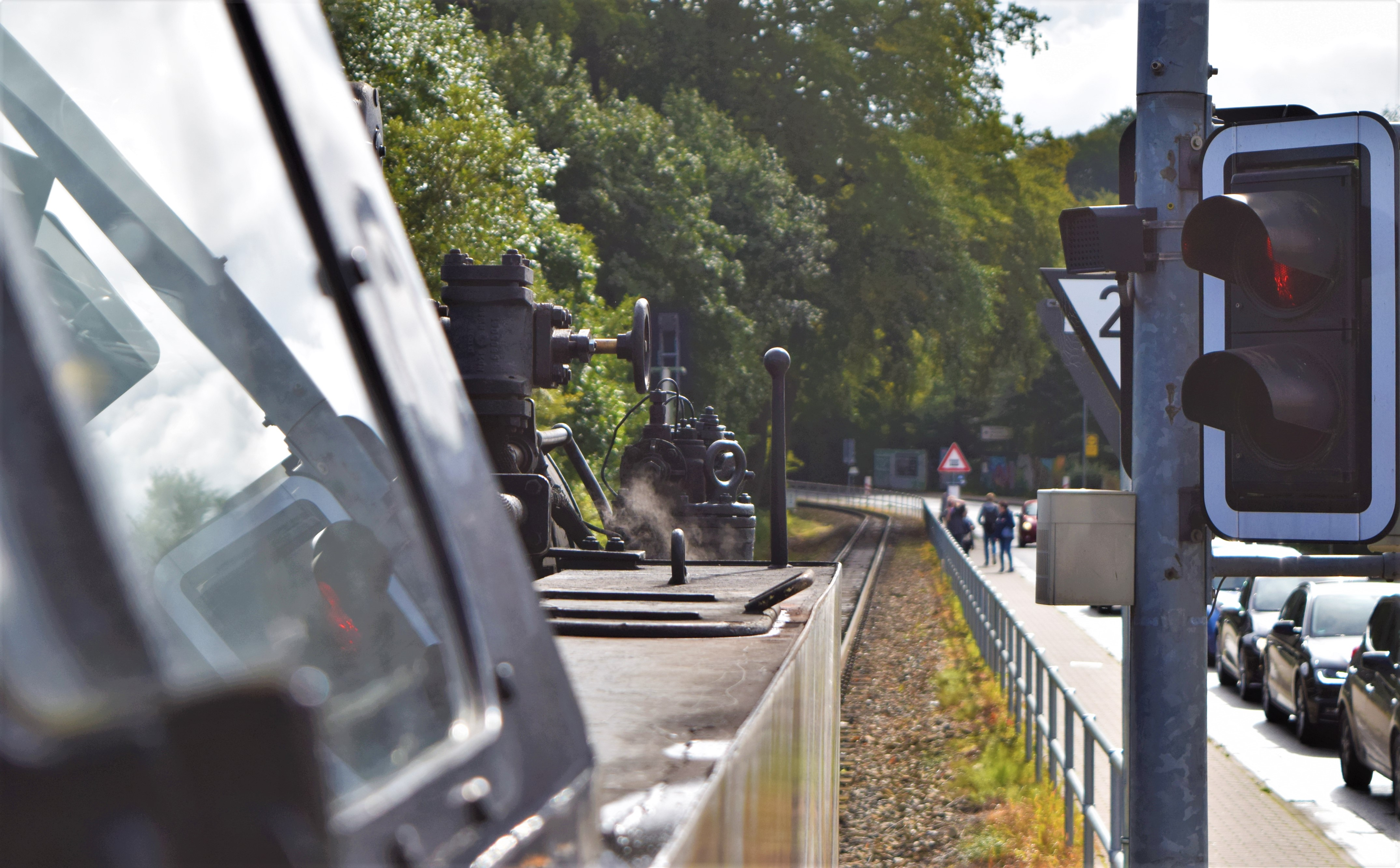 Kurz vor der Einfahrt in Bahnhof Bad Doberan